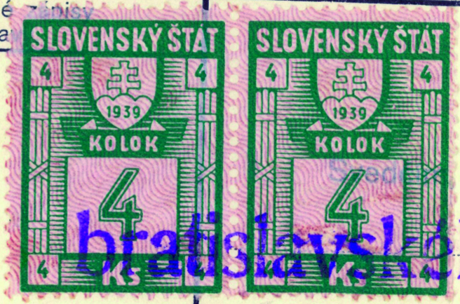 Kolok používaný v Slovenskej republike v roku 1939 s hodnotou 4Kč.